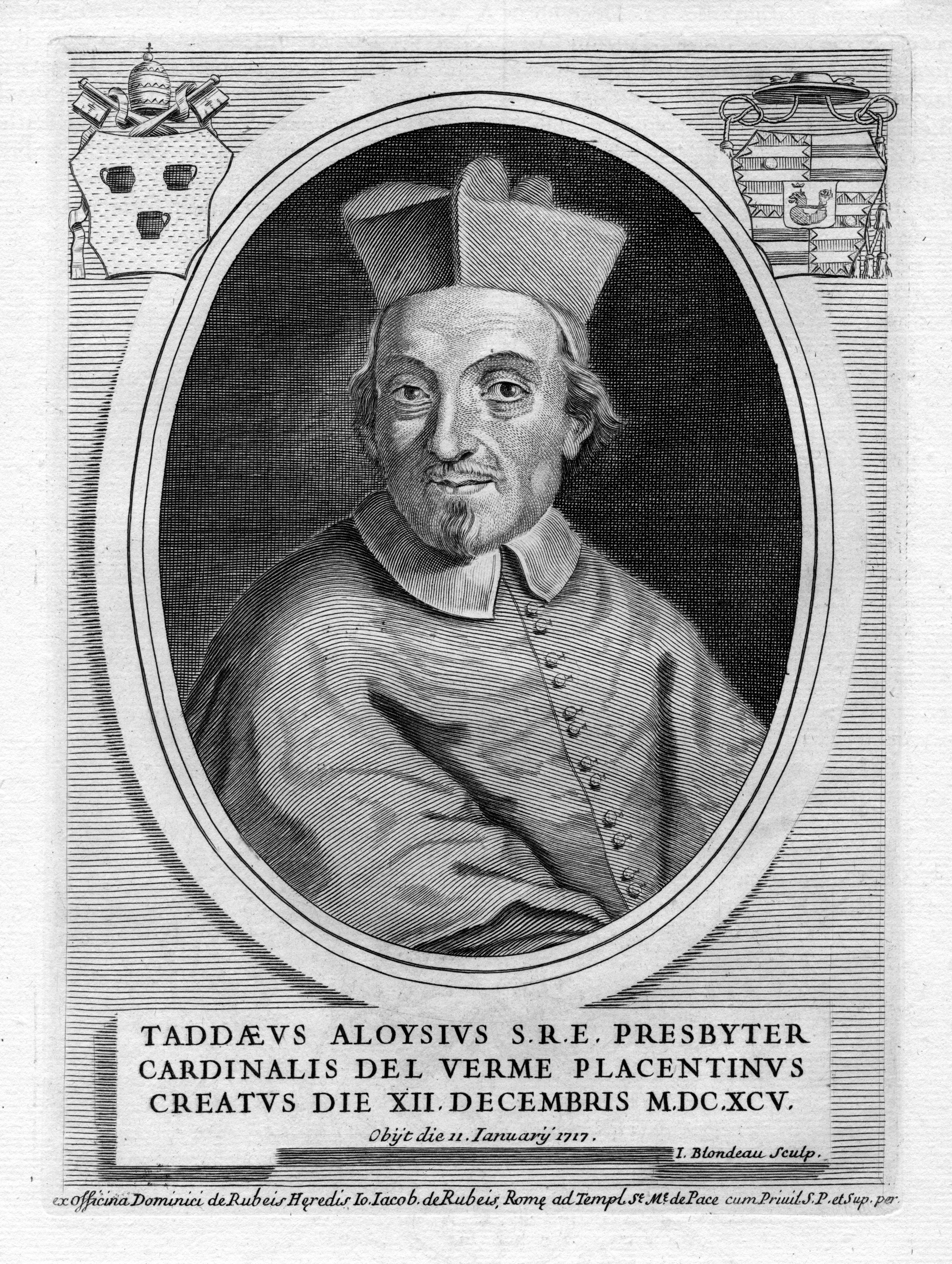 Portrait de Taddeo Luigi dal Verme (1641-1717)